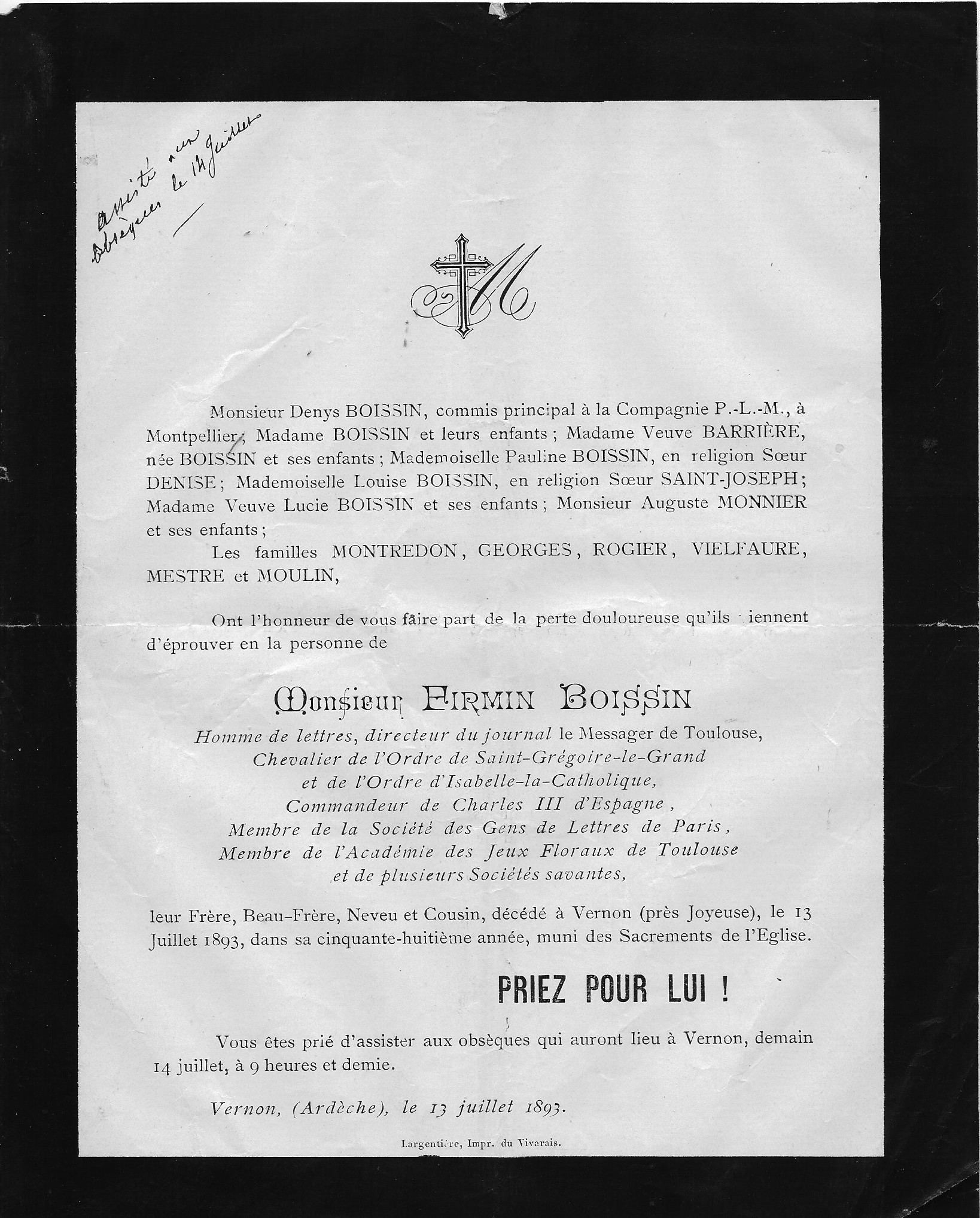 Faire-part de décès de Firmin Boissin du 13Juillet 1893.